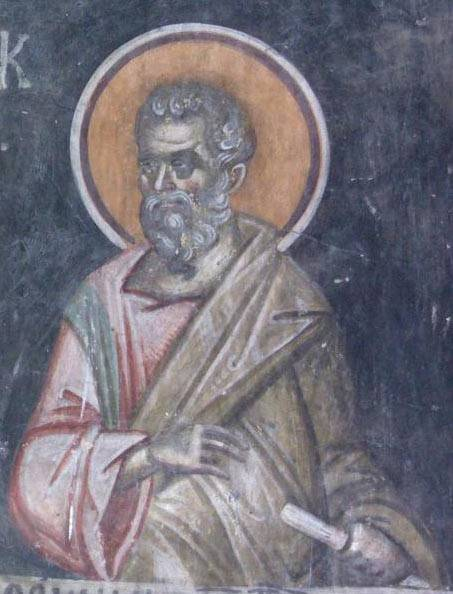 Saint Ananias - apostol, bishop